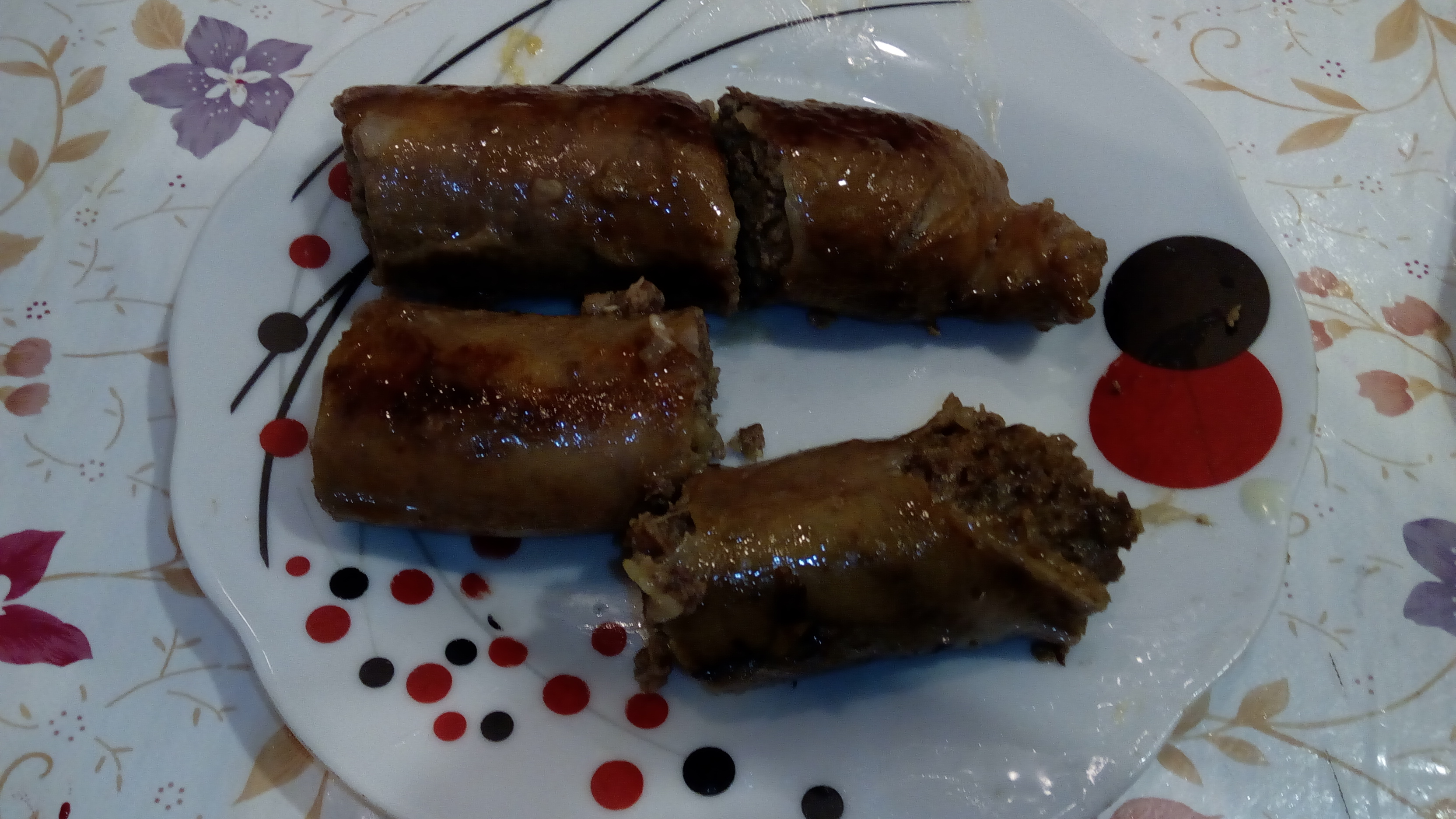 Bağırsaq dolması Daha ətrafı: bu videoda